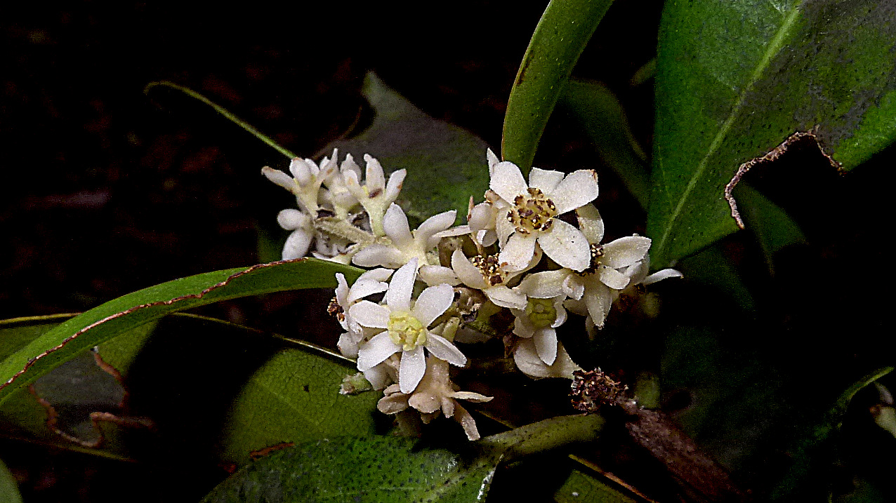 Ocotea fasciculata (Nees) Mez